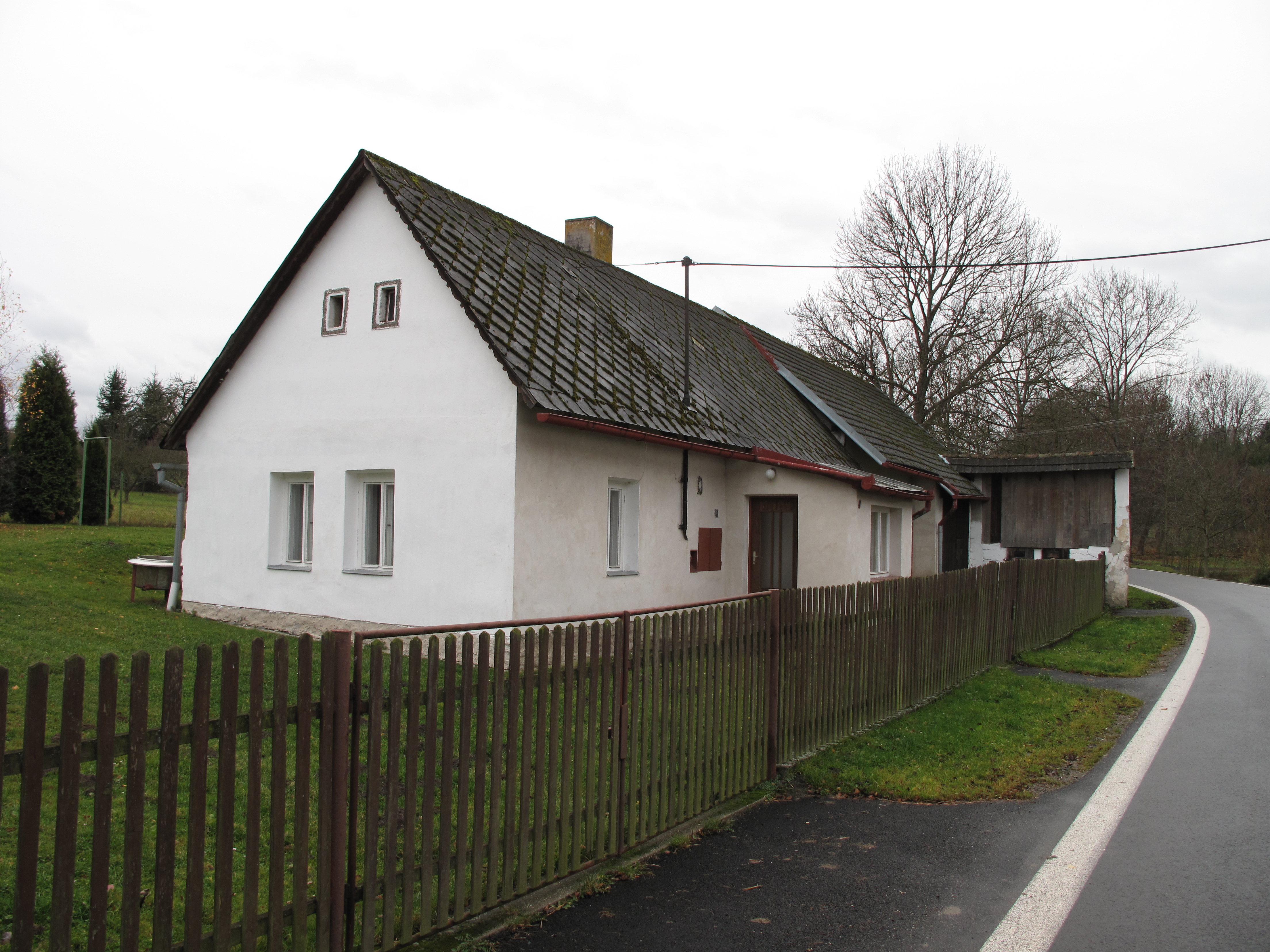 Dům v Ostrém. Okres Tábor, Česká republika.